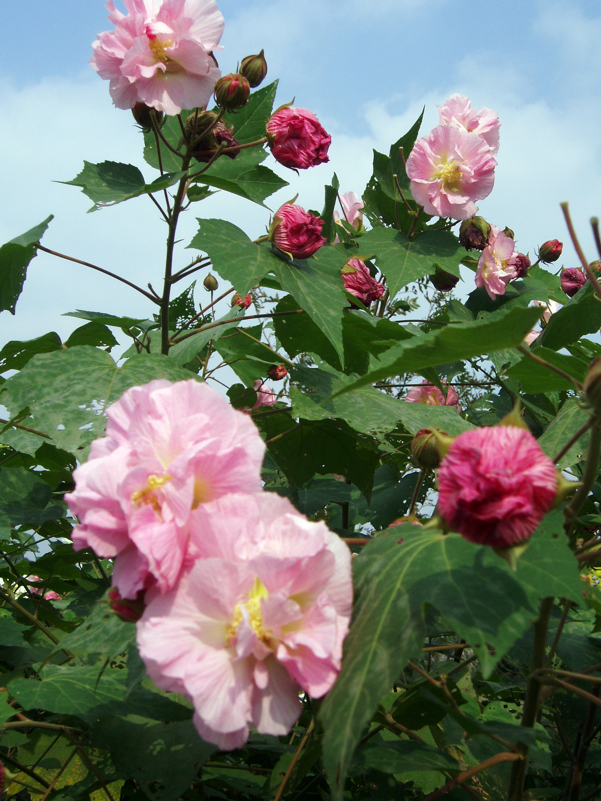 Confederate rose (Hibiscus mutabilis 'Versicolor')